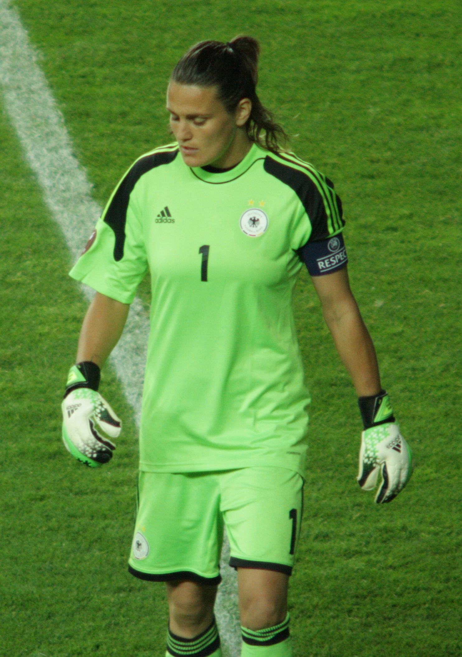 Angerer